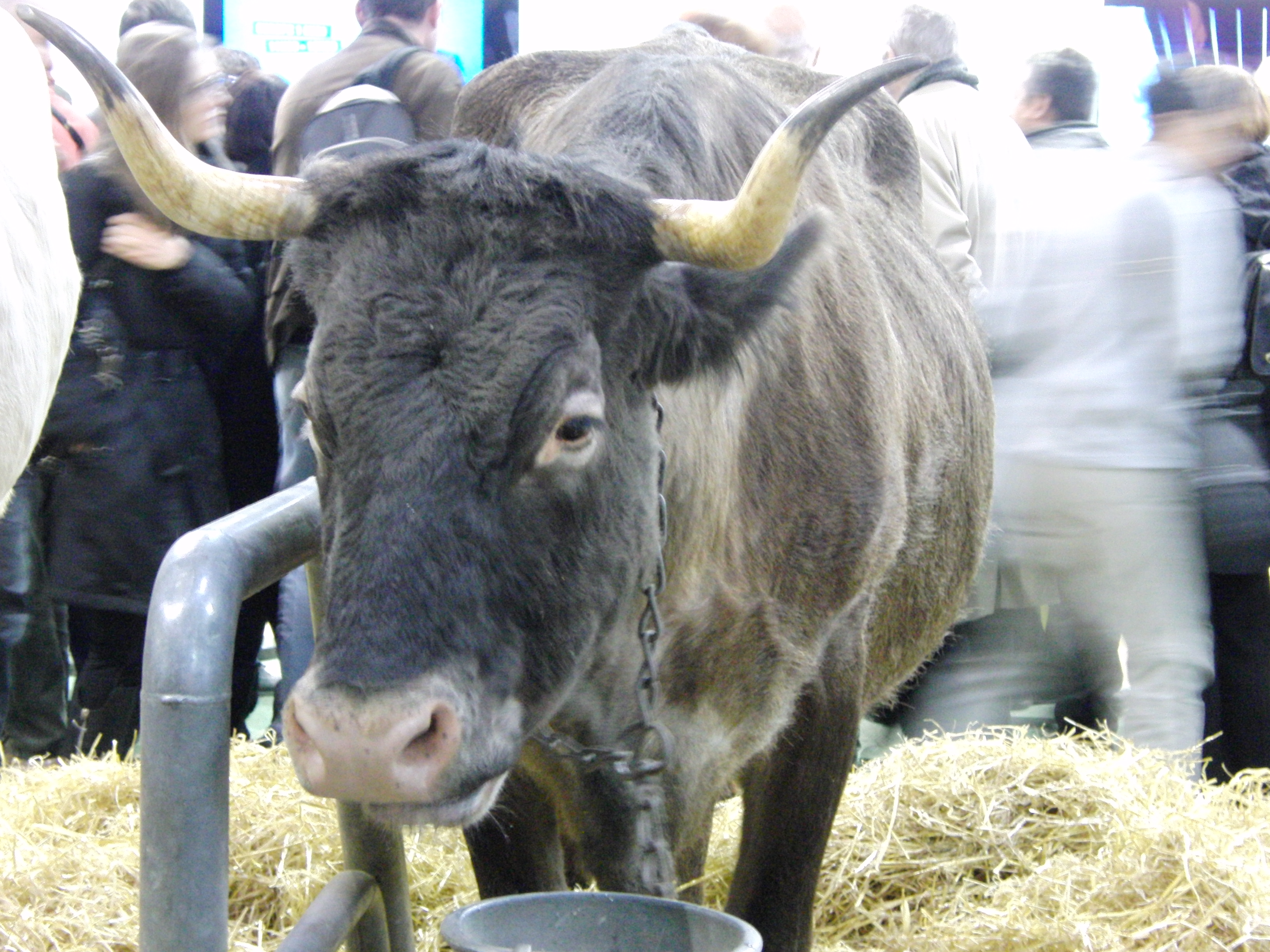 Vache Aure-et-Saint-Girons (Casta) - Salon international de l'agriculture 2013, Paris, France